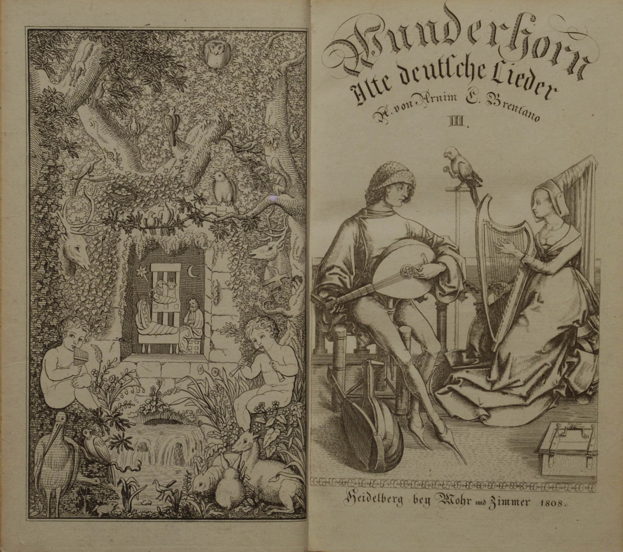 Des Knaben Wunderhorn 2 Titelkupfer Bd. III (1808)